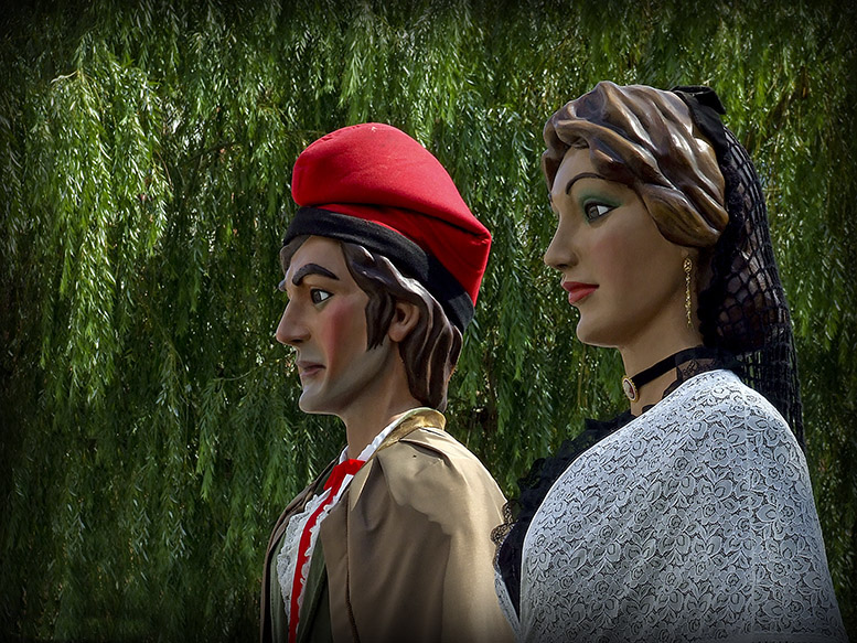 Marti i Carme Gegants de Puig-reig a la Plaça Nova de Puig-reig